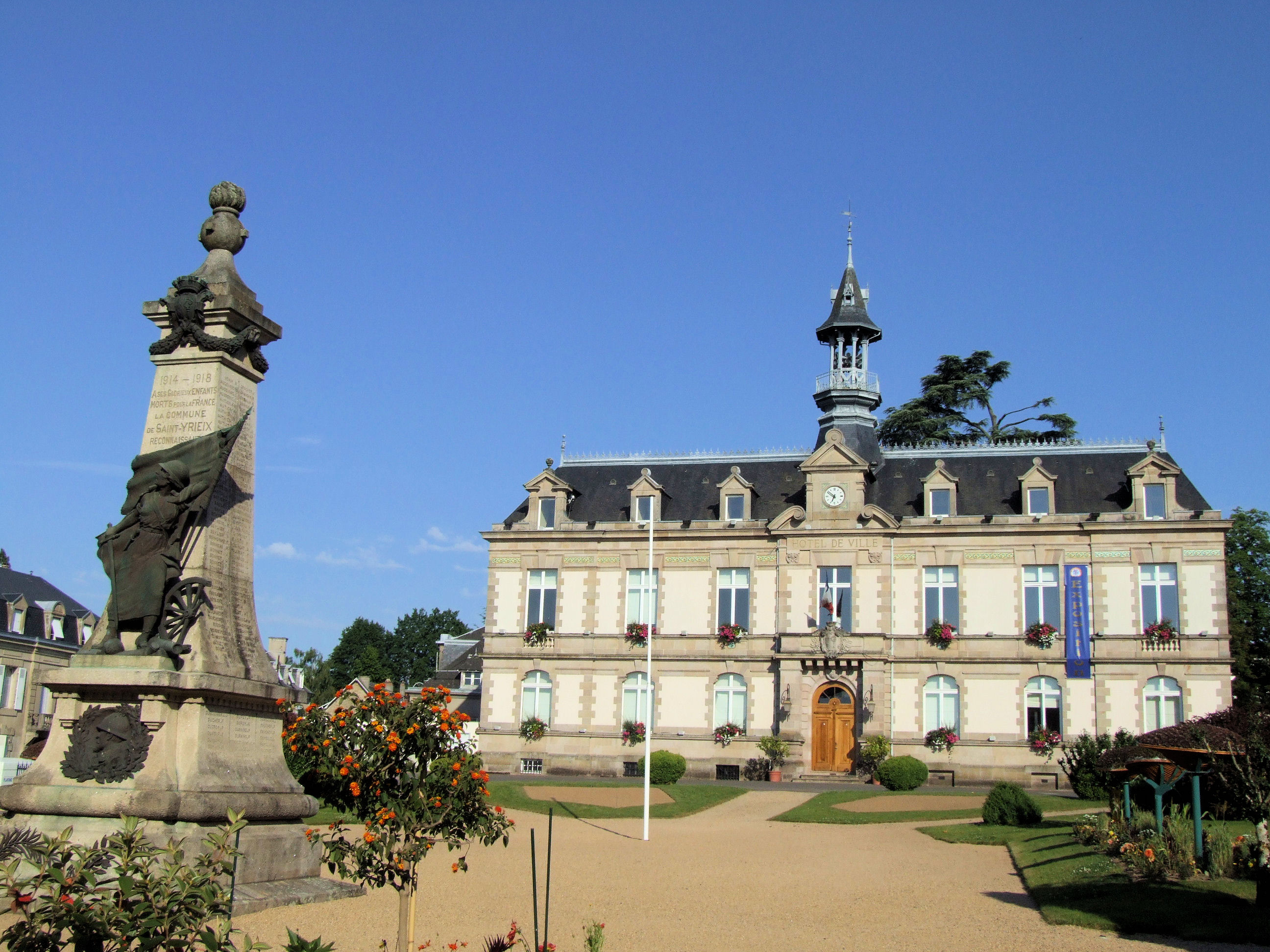 Saint-Yrieix-la-Perche - Mairie